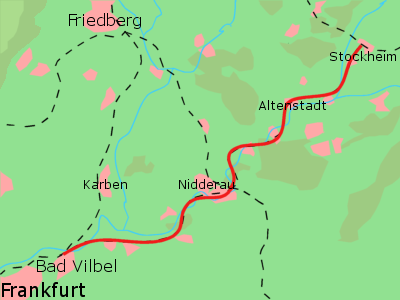 Map Niddertalbahn Germany